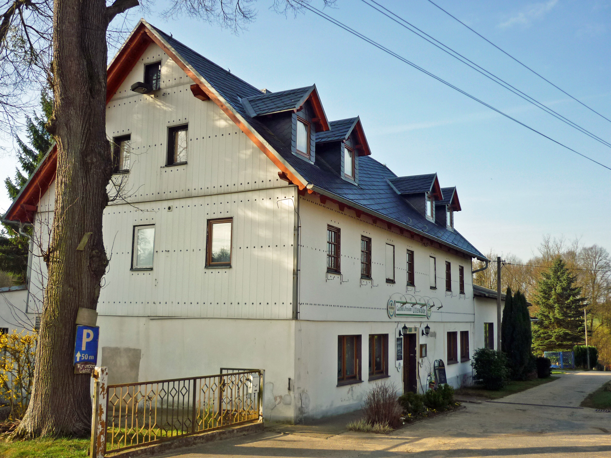 Gasthaus Uttewalde